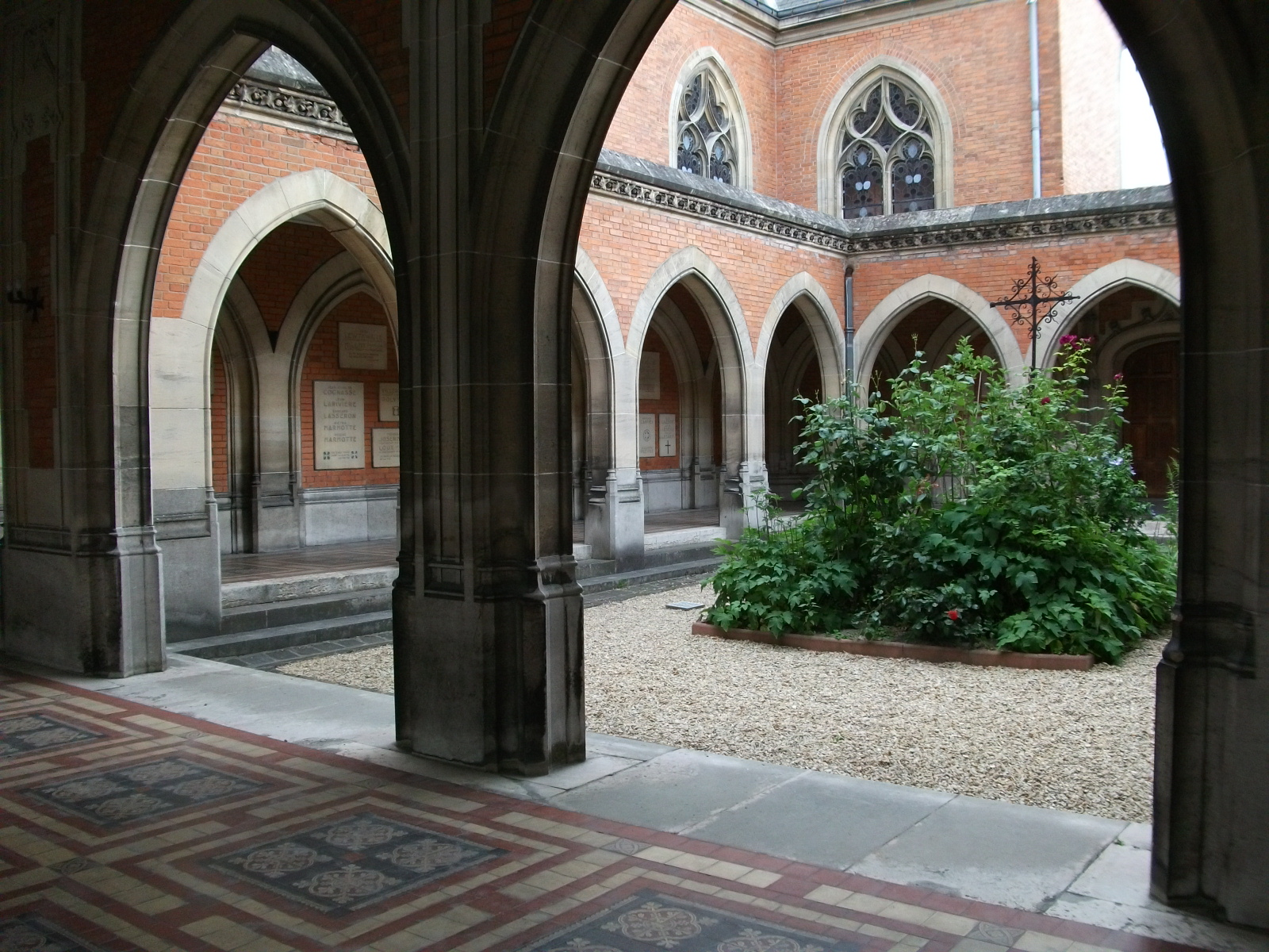 patio en face de l'entrée du Temple de Reims